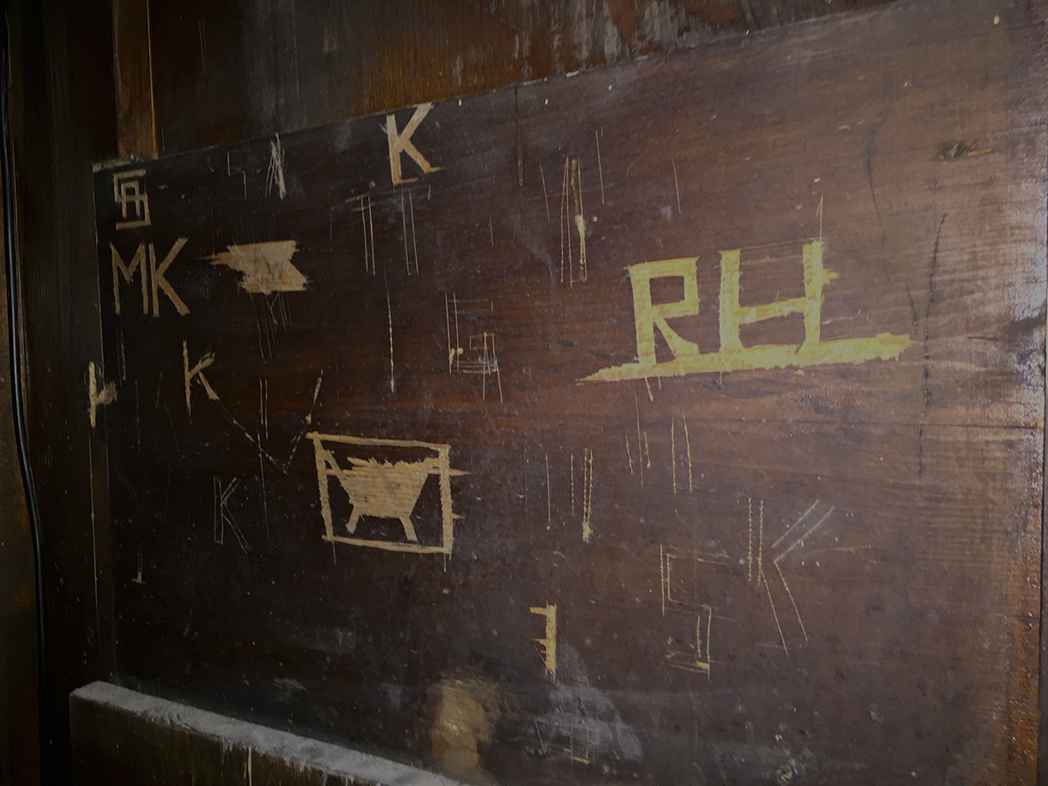 Gravuren ehemaliger Blasebalgtreter im Gehäuseinnern der Strebel-Orgel in St. Michael zu Stadtsteinach. Das Foto dokumentiert den Zustand 2017.